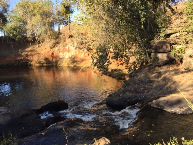 Bela cachoeira localizada no Distrito de Lamounier, que serve como ponto de encontro no período do verão.